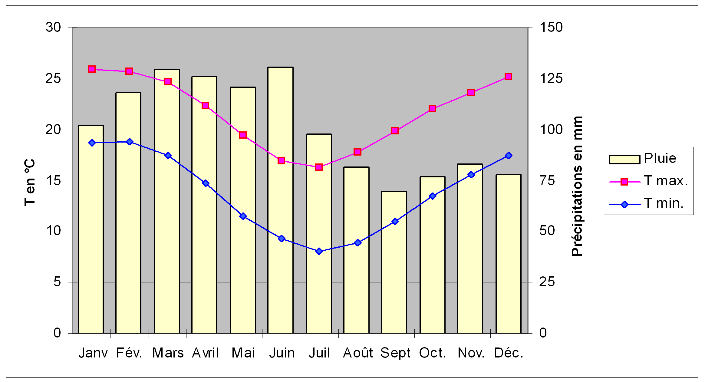 Diagramme climatique de la ville de Sydney (Australie), comprenant deux courbes, représentant les températures maximales et minimales, et un histogramme, représentant la pluviométrie, pour les douze mois de l'année.